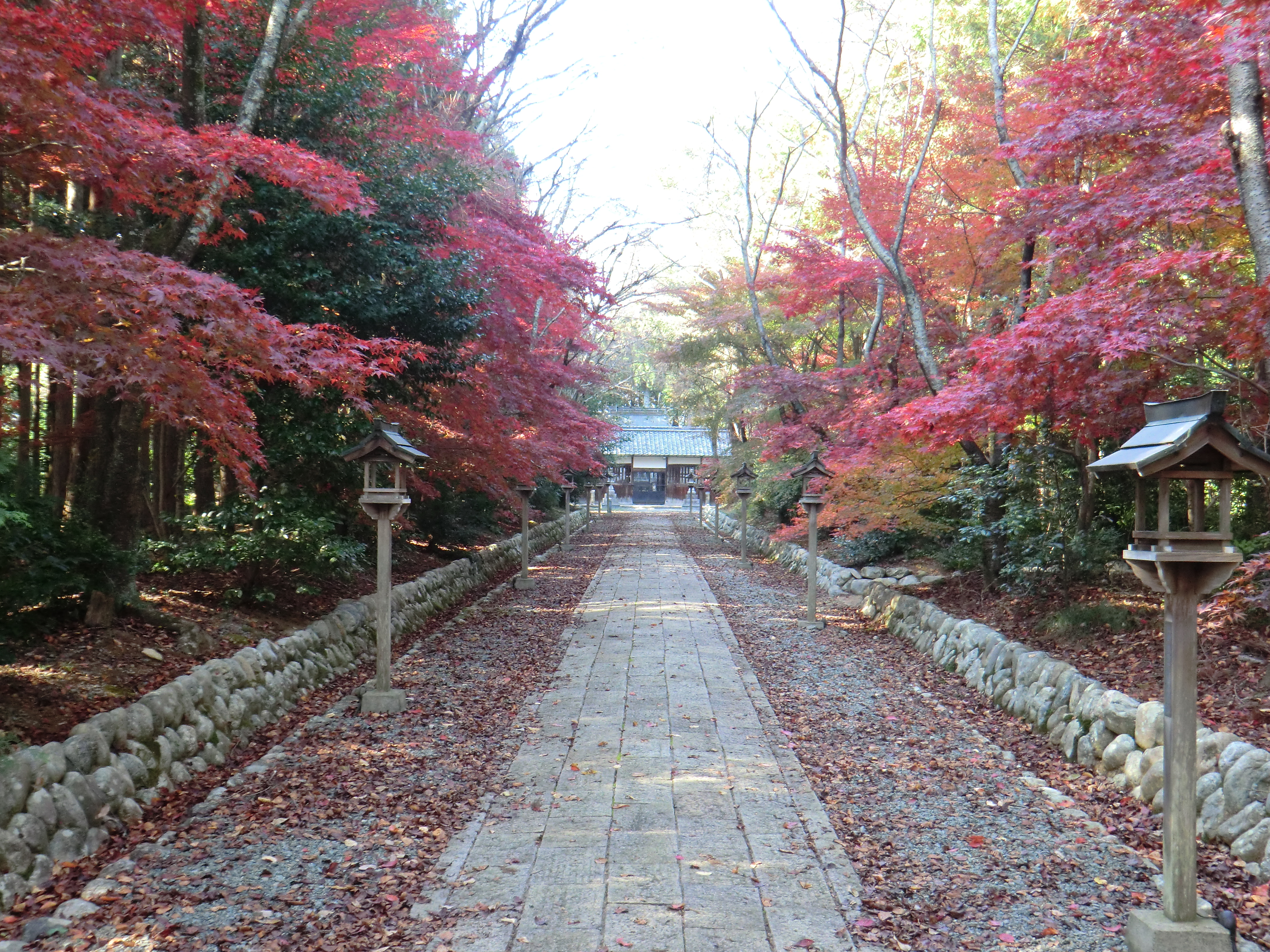 桧垣本八幡神社 (2014年11月撮影)